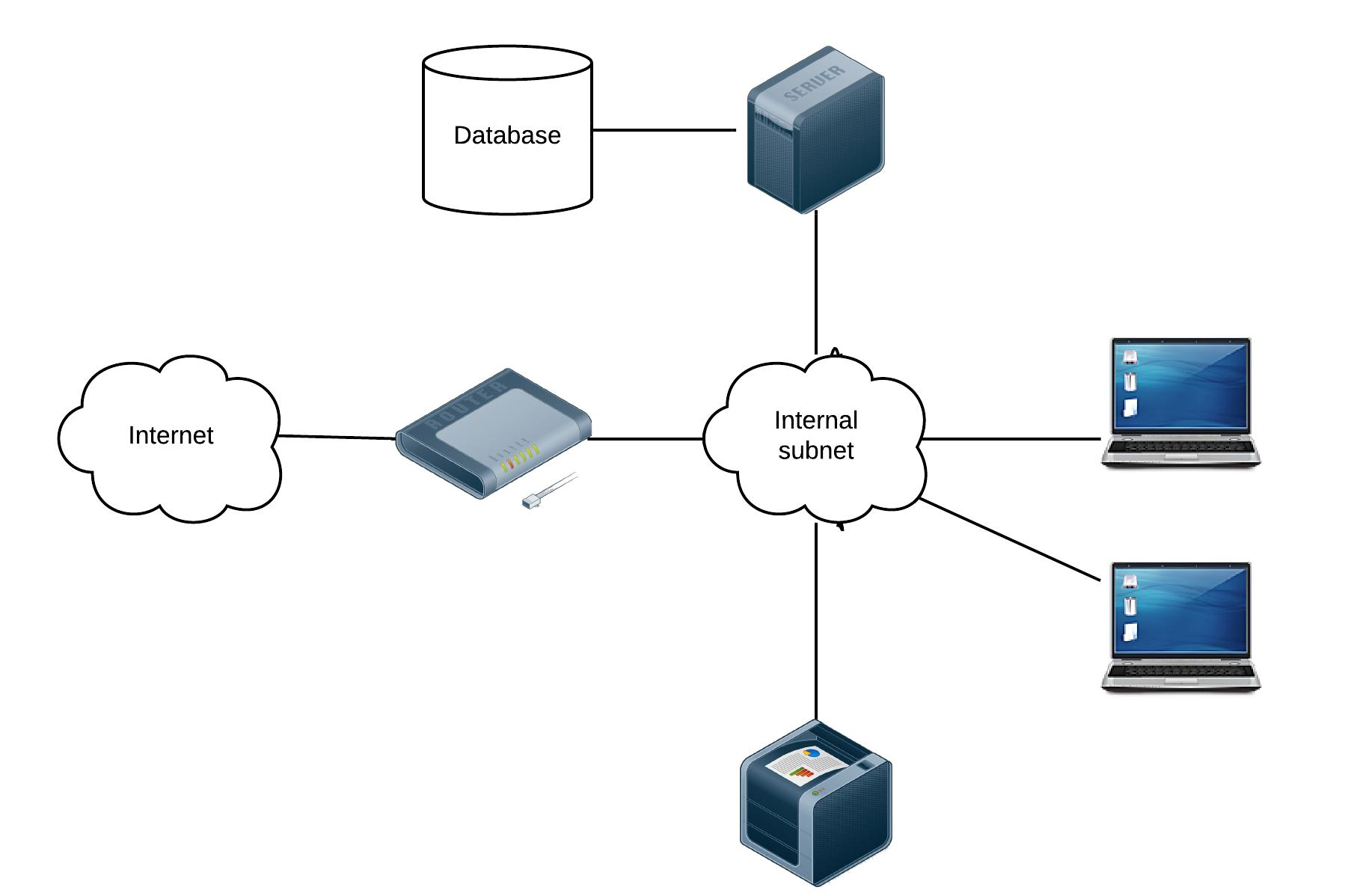 Монгол: Зураг 2 - Network Model